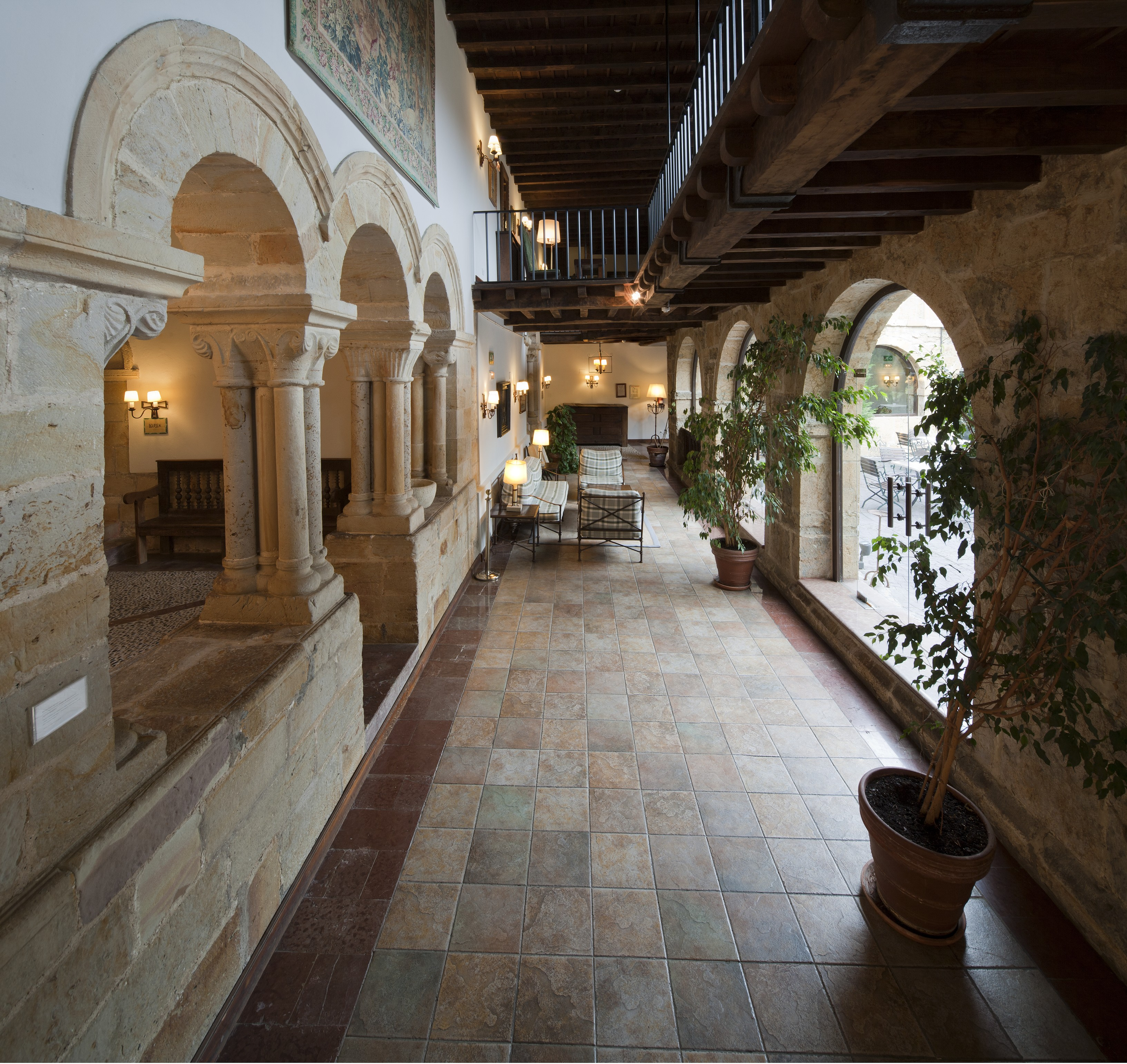 Parador de Cangas de Onis pasillo